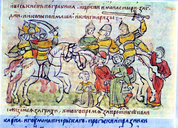 Взятие Киева в 1169 году. Миниатюра из Радзивилловской летописи, XV век, Библиотека Академии наук, Санкт-Петербург